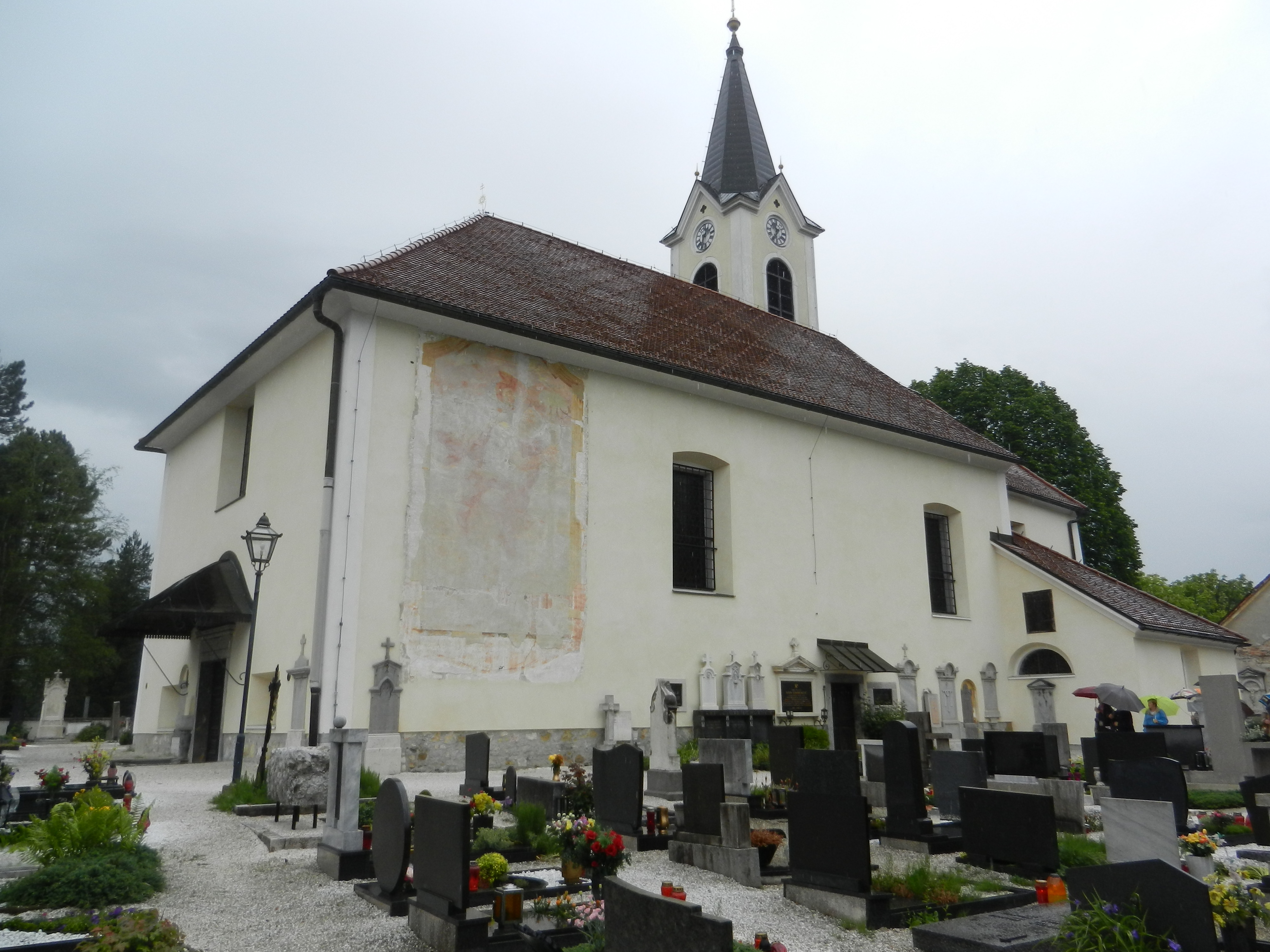 cerkev Marijine in Jožefove zaroke, Žale, Kamnik, Slovenija.